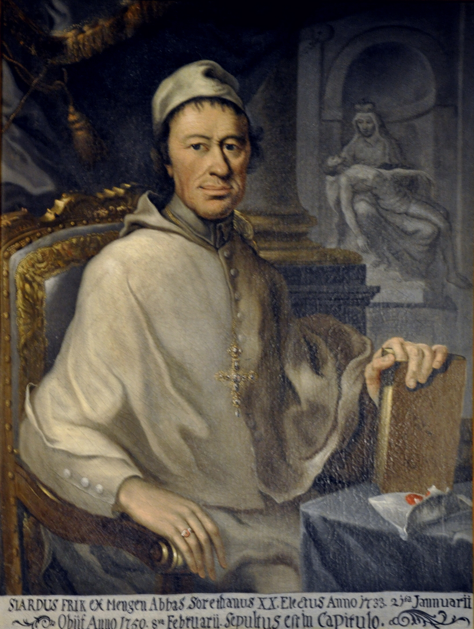 Portraits der Äbte von Schussenried